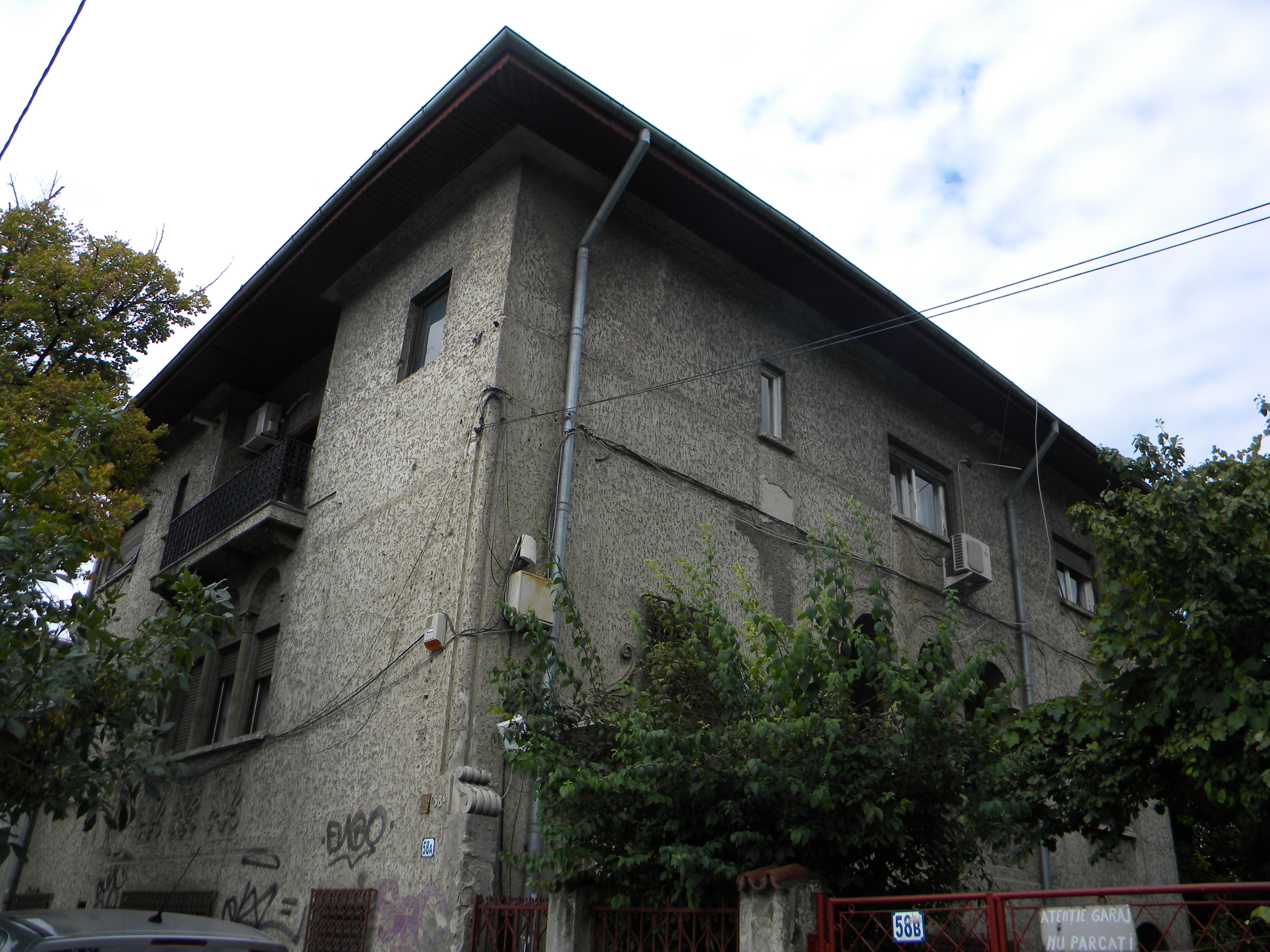 Bucuresti, Romania, Casa pe Calea Plevnei nr. 58 (imagine pe colt)